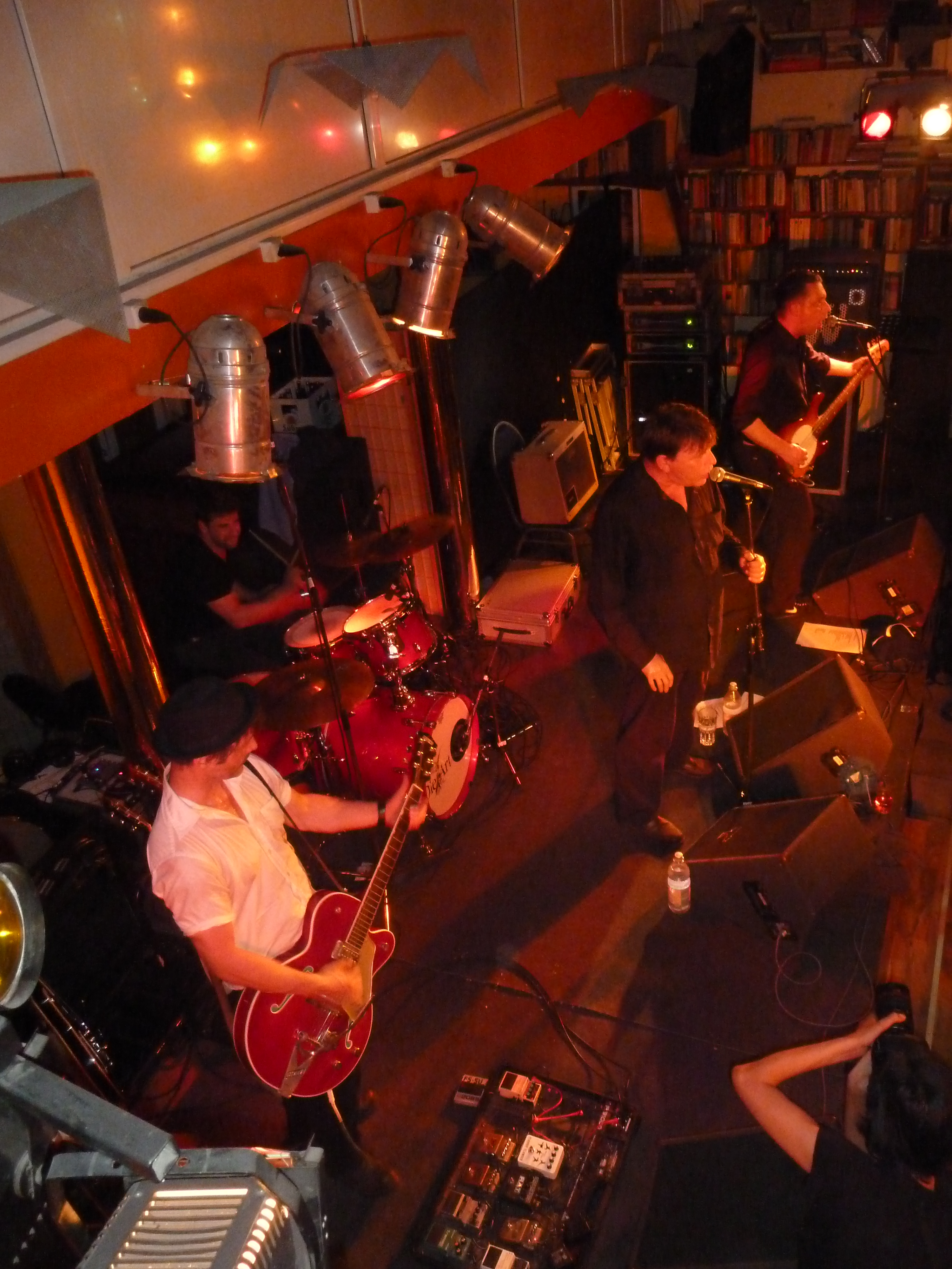 Die Art